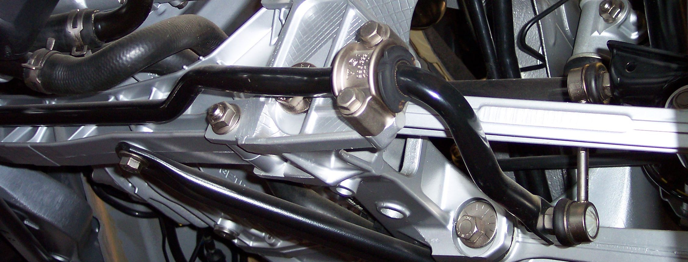 Stabilisator an der Hinterachse eines Porsche 996 Carrera